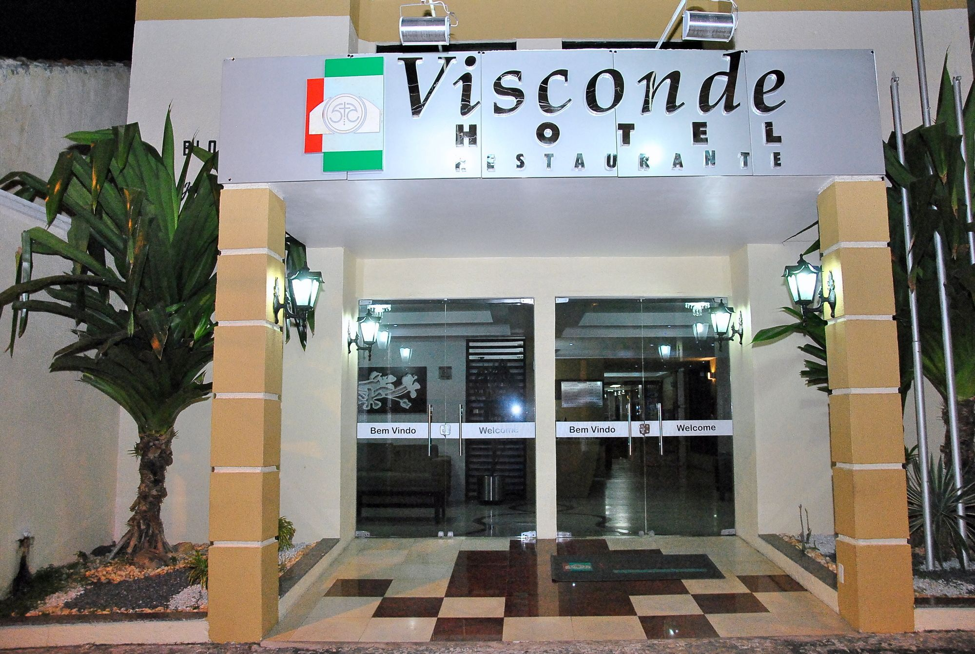 Frente do Visconde Hotel